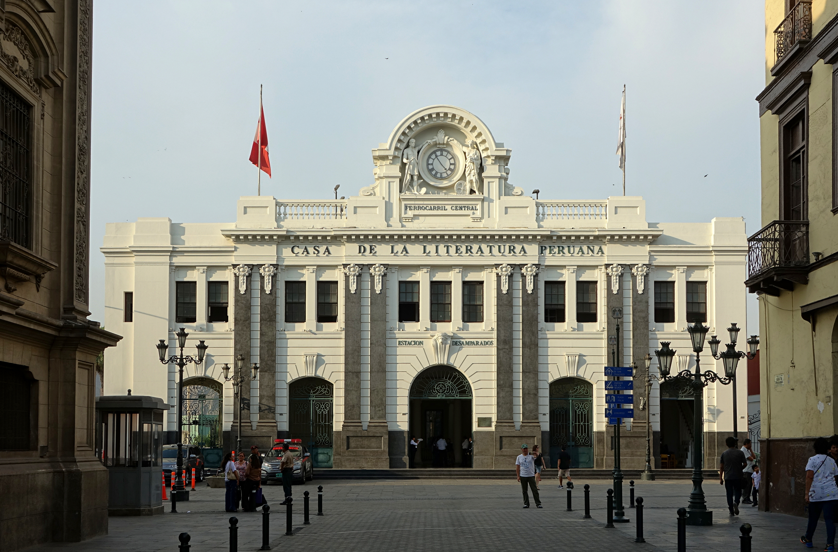 Casa de la Literatura Peruana dans l'ancienne gare de Lima (Pérou).